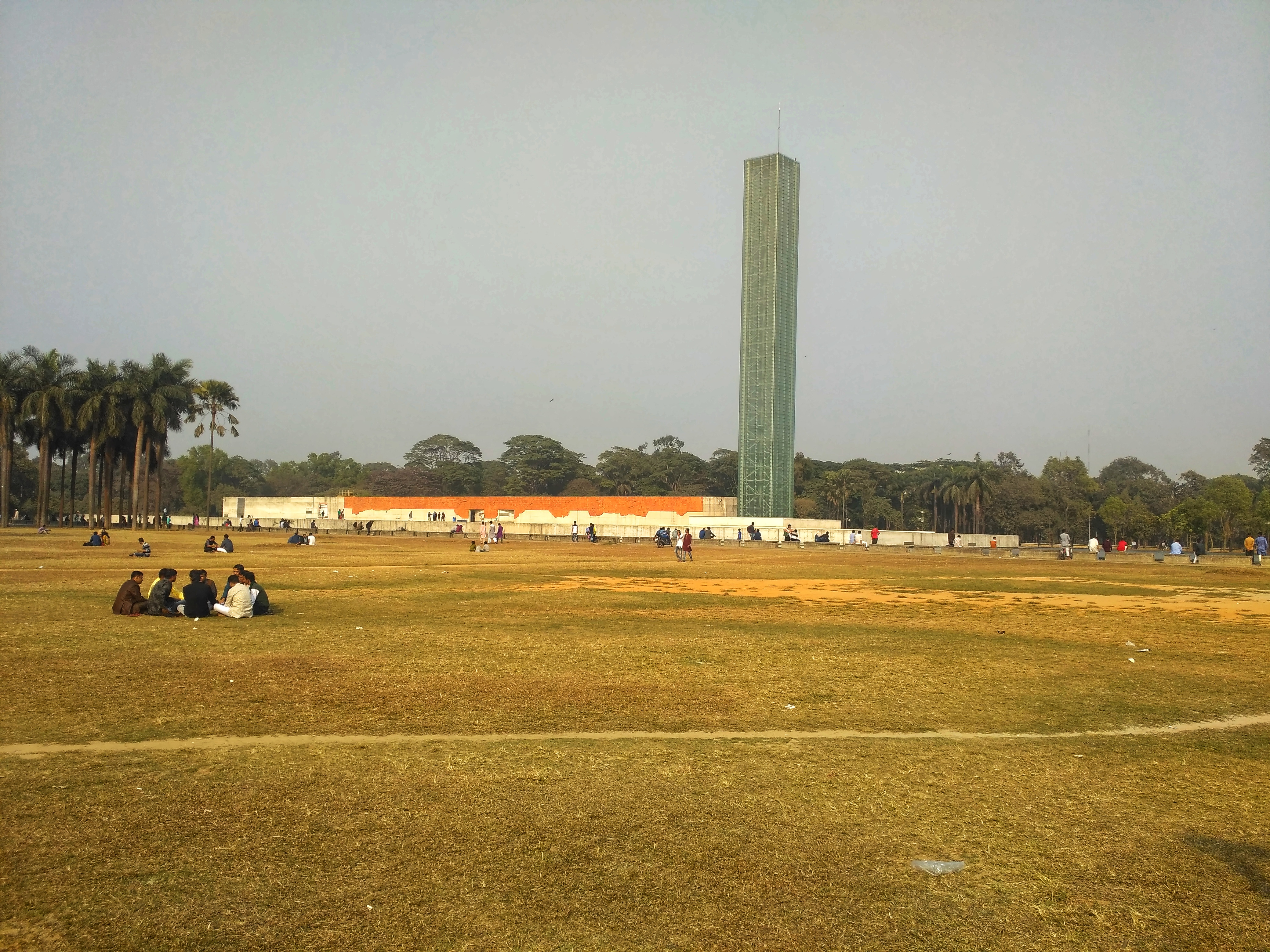 Shadhinota Stambha (Independence Tower) at Suhrawardi Uddan, Dhaka.